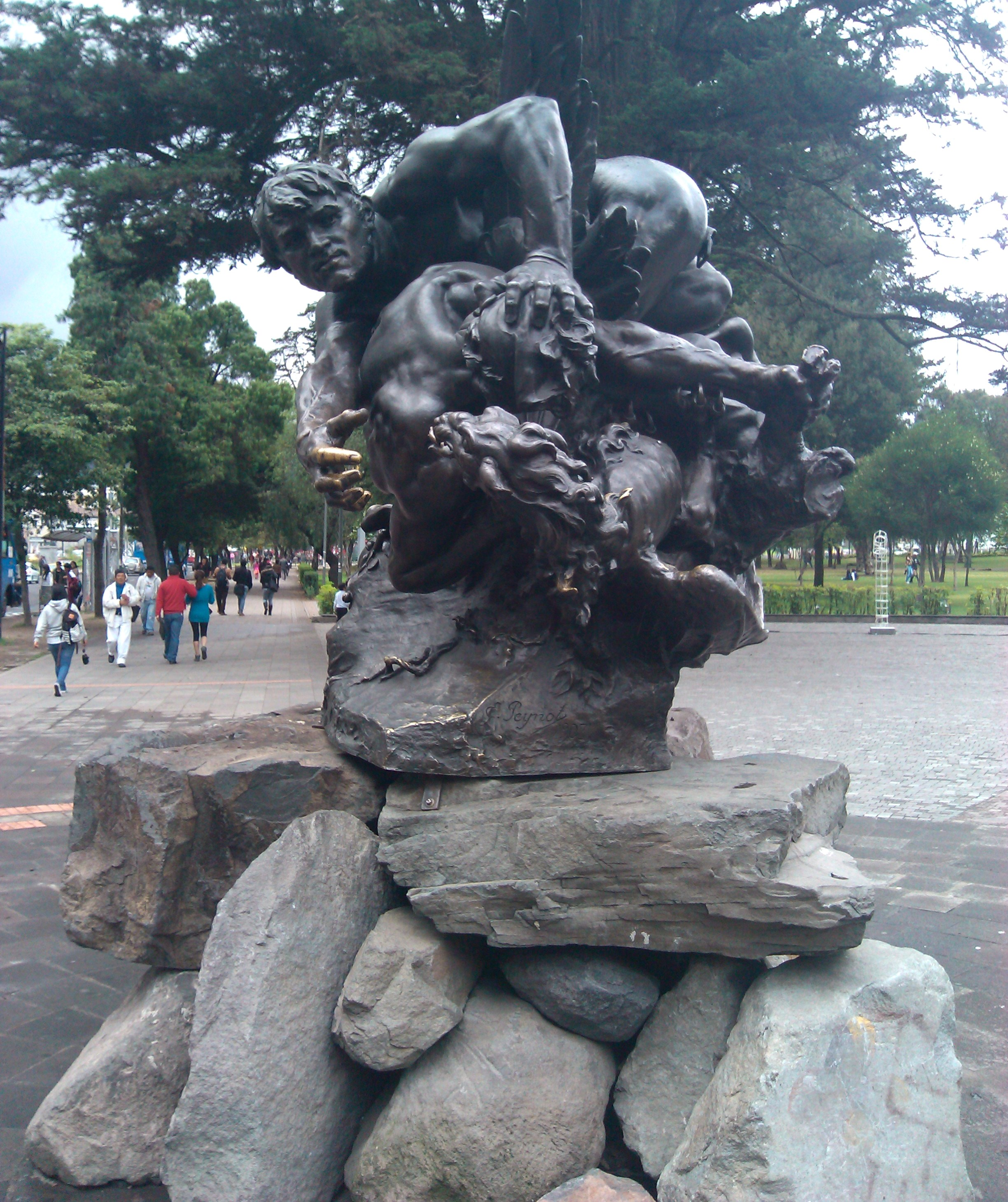 Escultura de La Lucha Eterna, del escultor francés Emile Peynot. Comisionada y obsequiada a la ciudad de Quito por la comunidad de ecuatorianos residentes en Francia, para conmemorar el centenario de la Batalla de Pichincha en 1922. Actualmente ubicada en el parque El Ejido, en el remate de la avenida Amazonas con Patria.